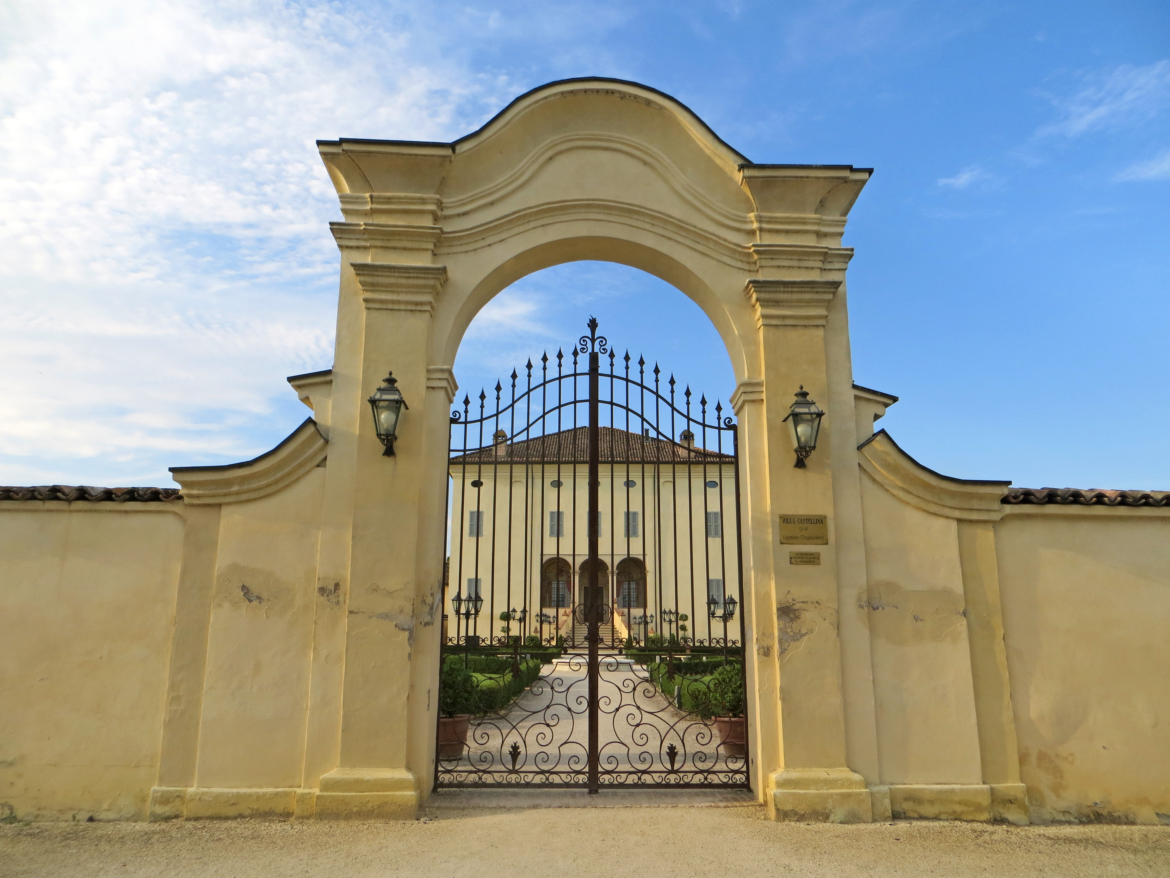 Villa Castellina (Castellina, Soragna) - arco d'ingresso al parco